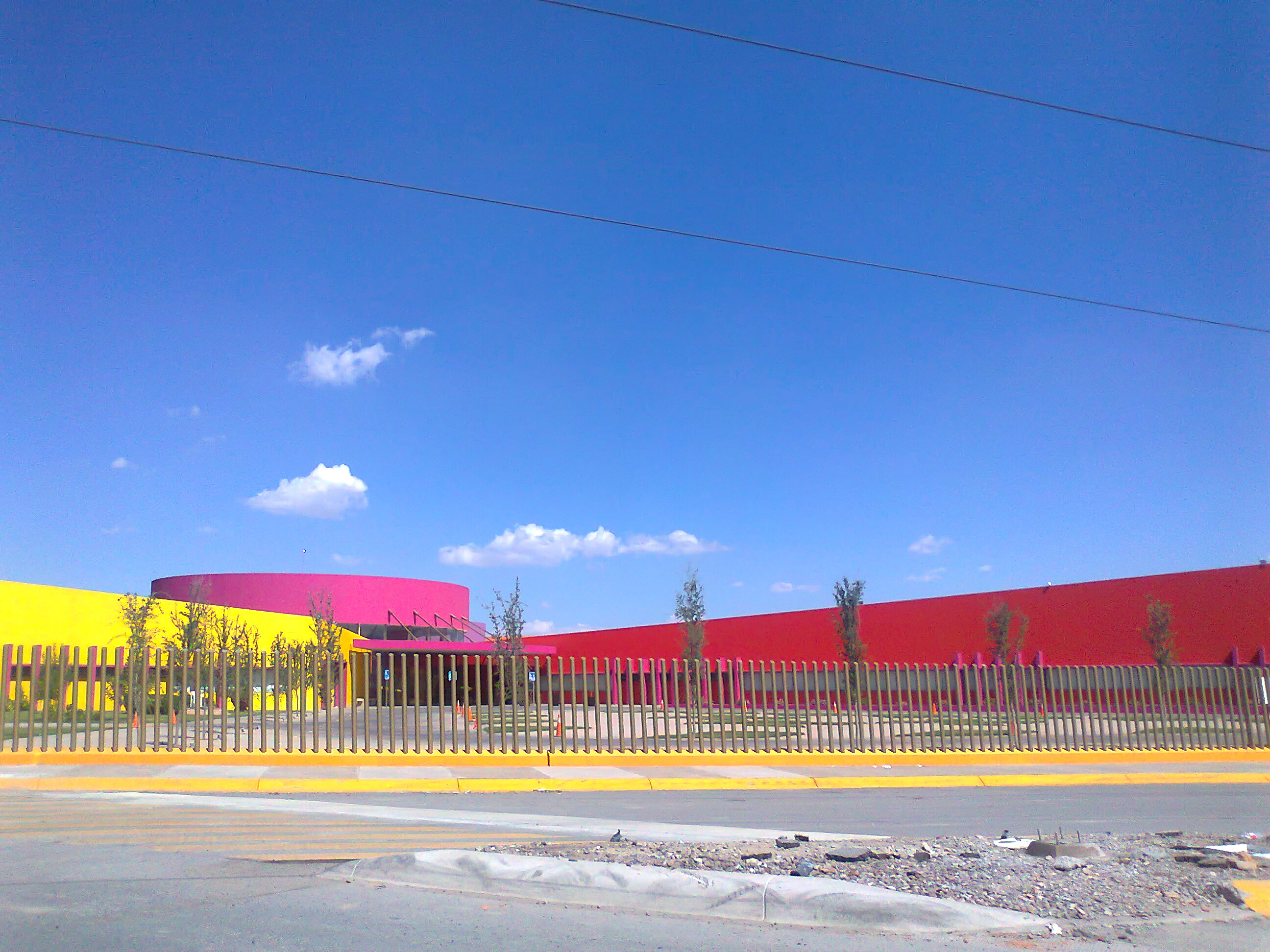 CRIT Gómez Palacio